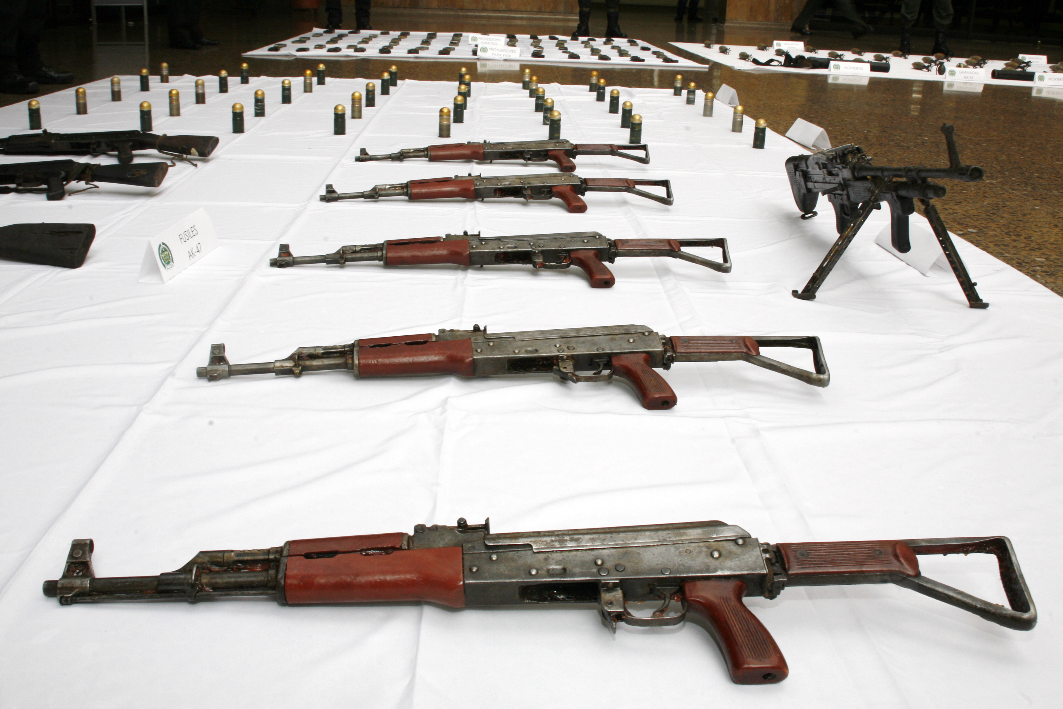 La Policía se incautó poderoso material de guerra en zona selvática del Meta, donde se cuentan ametralladoras, granadas, fusiles y 25.000 cartuchos La disidencia del ERPAC “Bloque Libertadores del Vichada”, intentaba consolidar en los Llanos un corredor para el tráfico de estupefacientes.